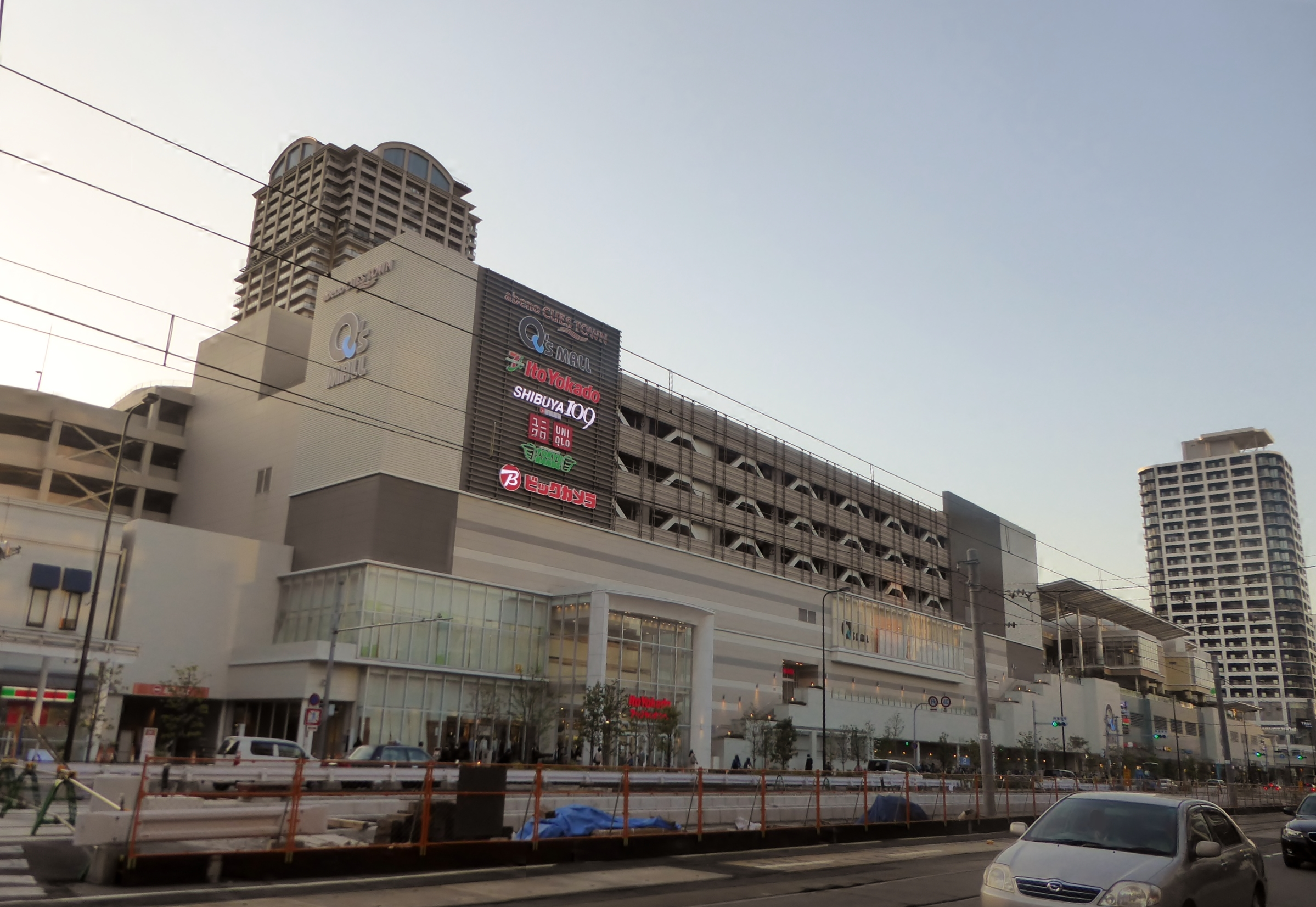 2016年4月22日時点のあべのキューズタウンを撮影。